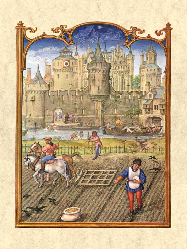 Oktober, Brevarium Grimani, fol. 11v (Flemish)